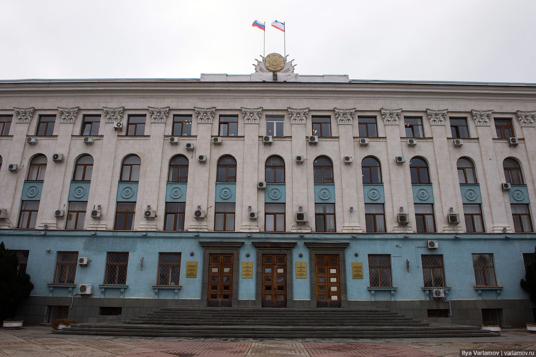 Симферополь, Варламов, 24-25 ноябрь 2015